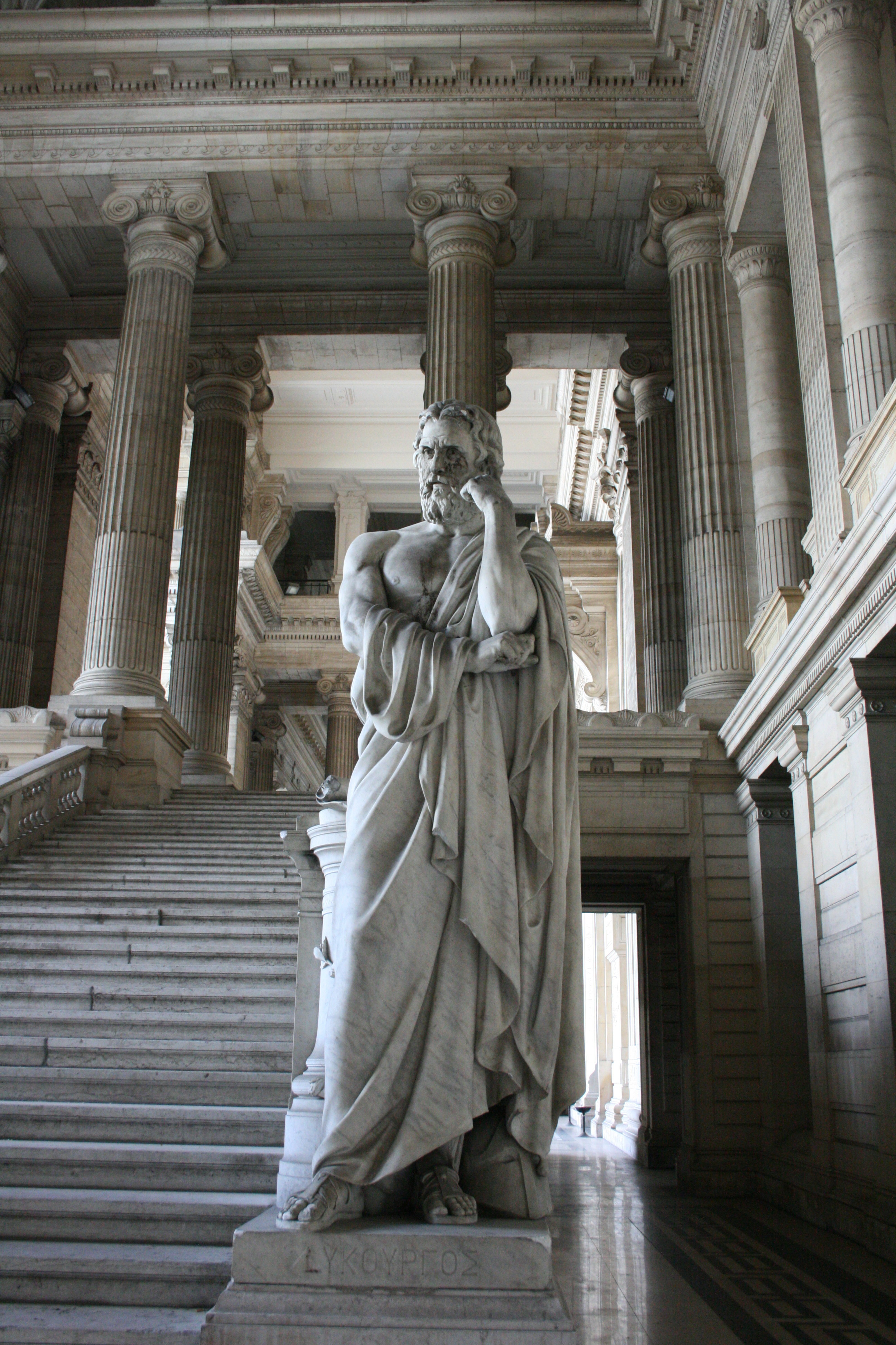 Palais de Justice, place Poelaert, Bruxelles (Belgique). Architecte: Joseph Poelaert. Escalier avec statue de Lycurge